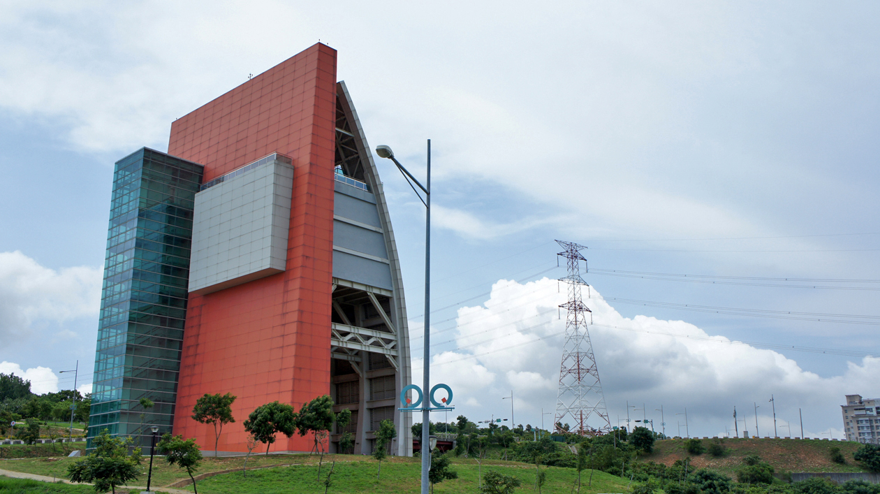 中部科學園區台中基地科園路水塔。